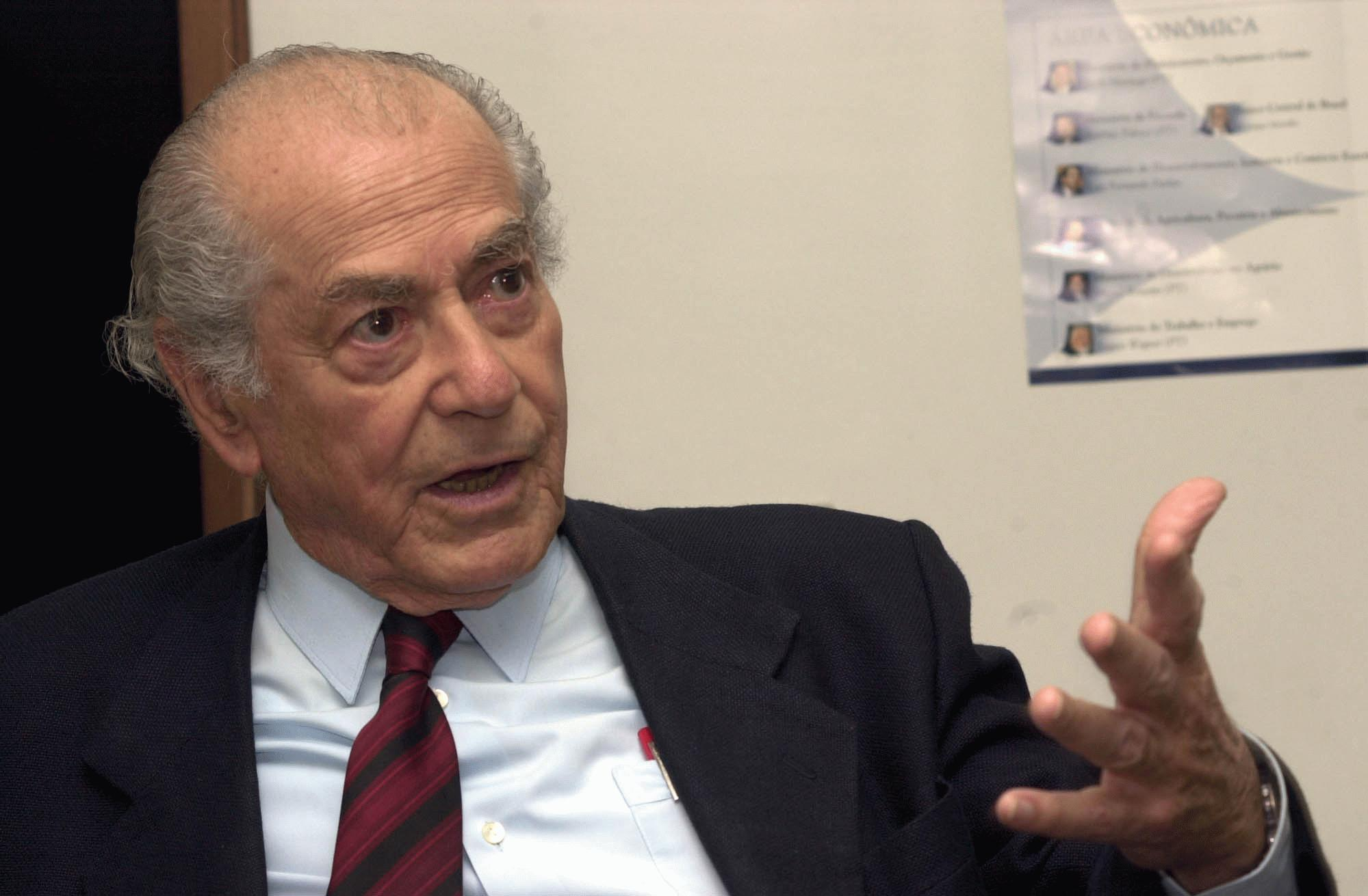 O político brasileiro Leonel Brizola.